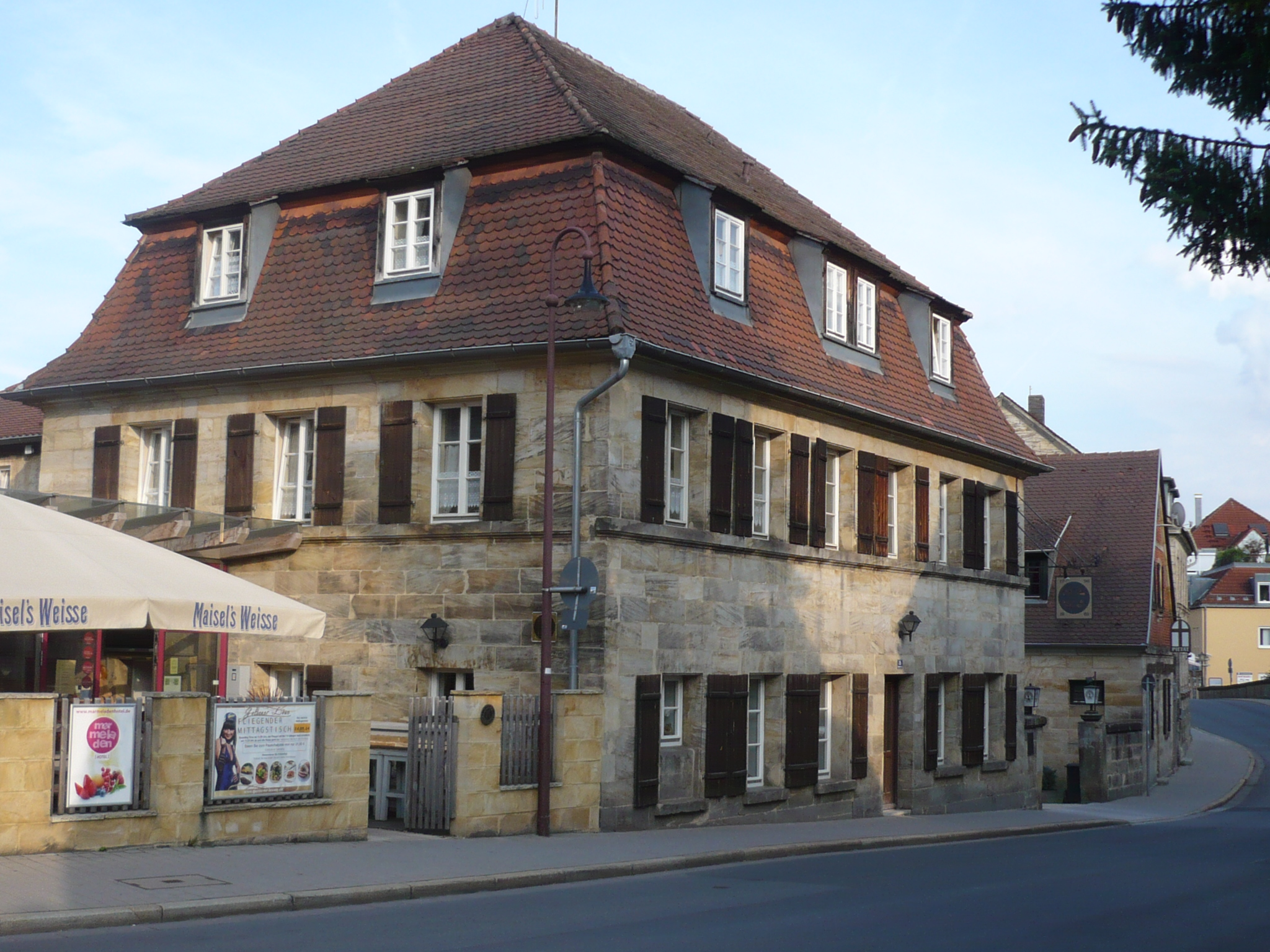 Spiegelmühle Bayreuth